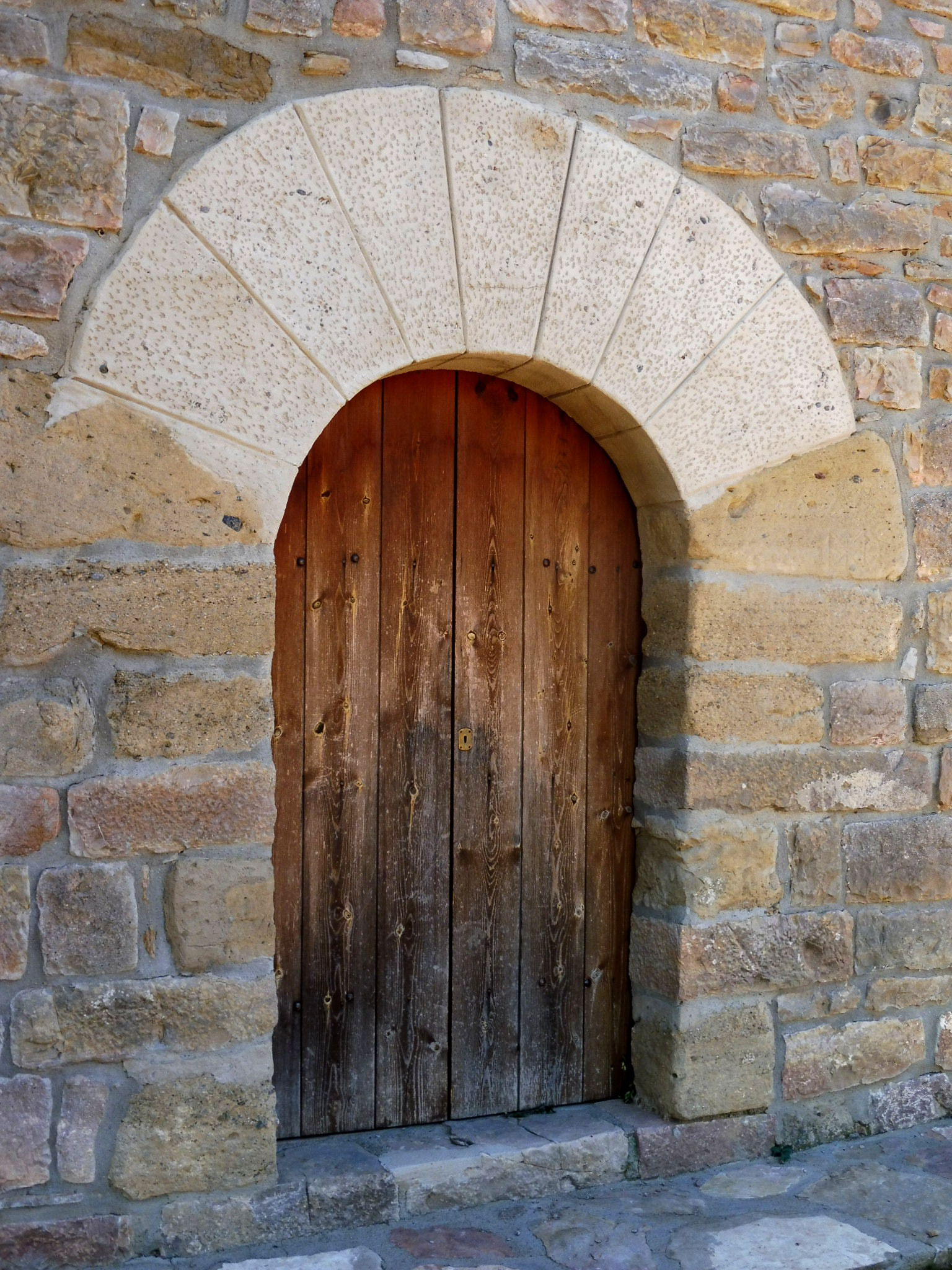 Església de Sant Jaume de la Boixadera dels Bancs (Montmajor): portal